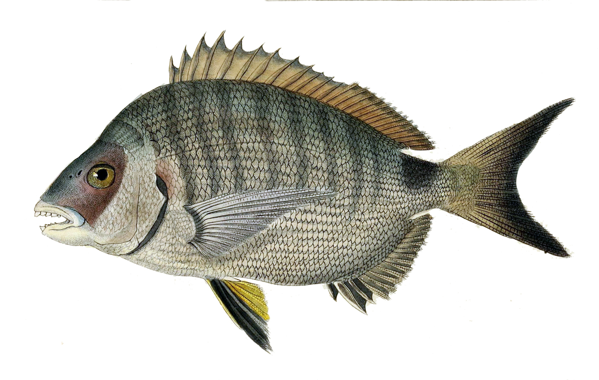 Diplodus sargus helenae